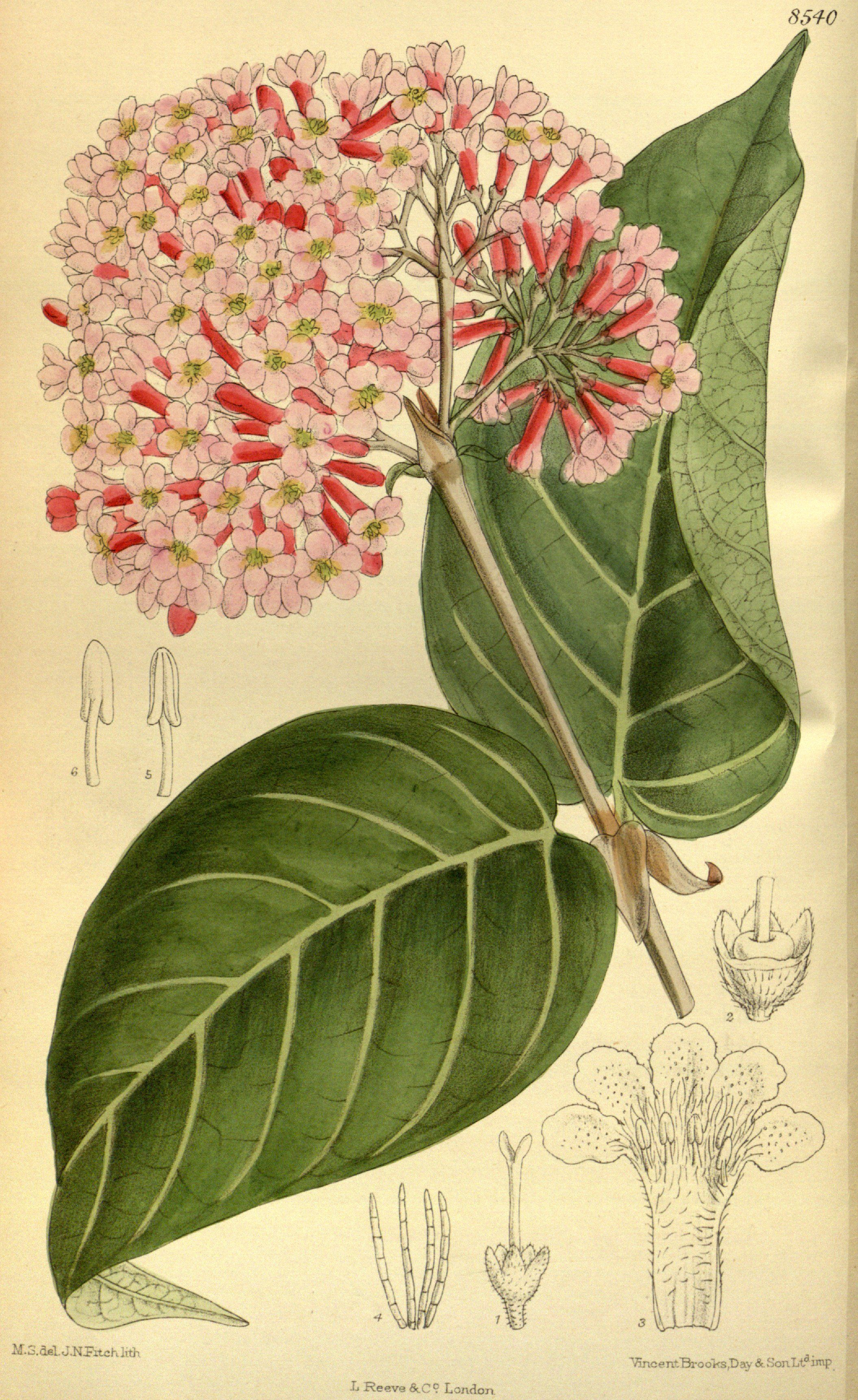 Rogiera cordata (syn. Rondeletia cordata), Rubiaceae